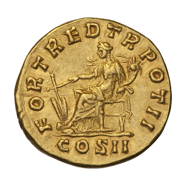 Ауреус. Луций Вер. Ок. 161—162 гг. (реверс). Надпись FORT RED TR POT II COS II. Фортуна (персонификация удачи) сидит на троне, влево; в правой руке держит руль, в левой — рог изобилия.